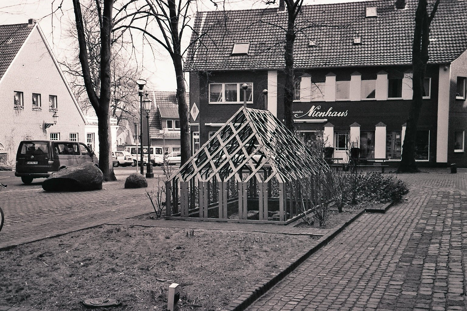 Frühchristliche Grabstelle an der ehemaligen Pfarrkirche von Seppenrade, Deutschland